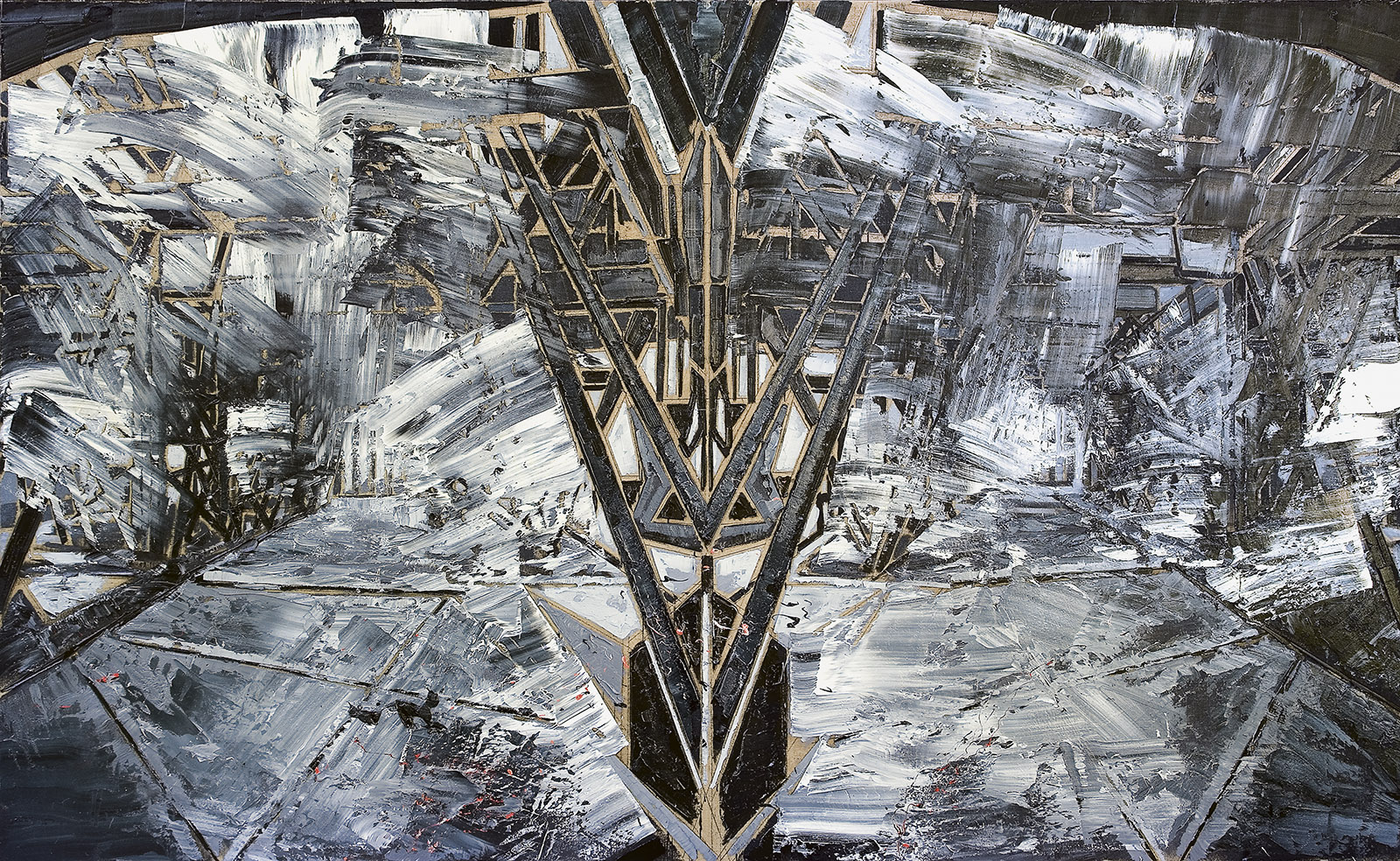 Jiří Sozanský, Skelet (olej)210 x 340 cm, 2013